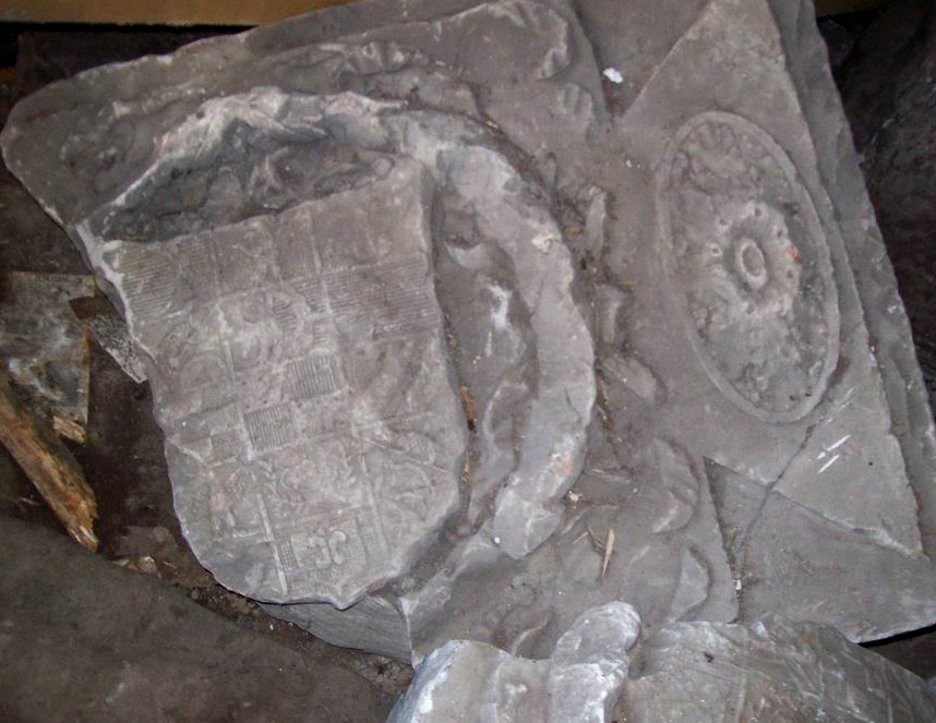 сучасний стан нагробка В.А. фон Ангальт-Бернбург-Шаумбург-Хоймського: сучасний стан нагробка